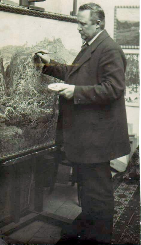 malíř Jaroslav Panuška při práci v atelieru